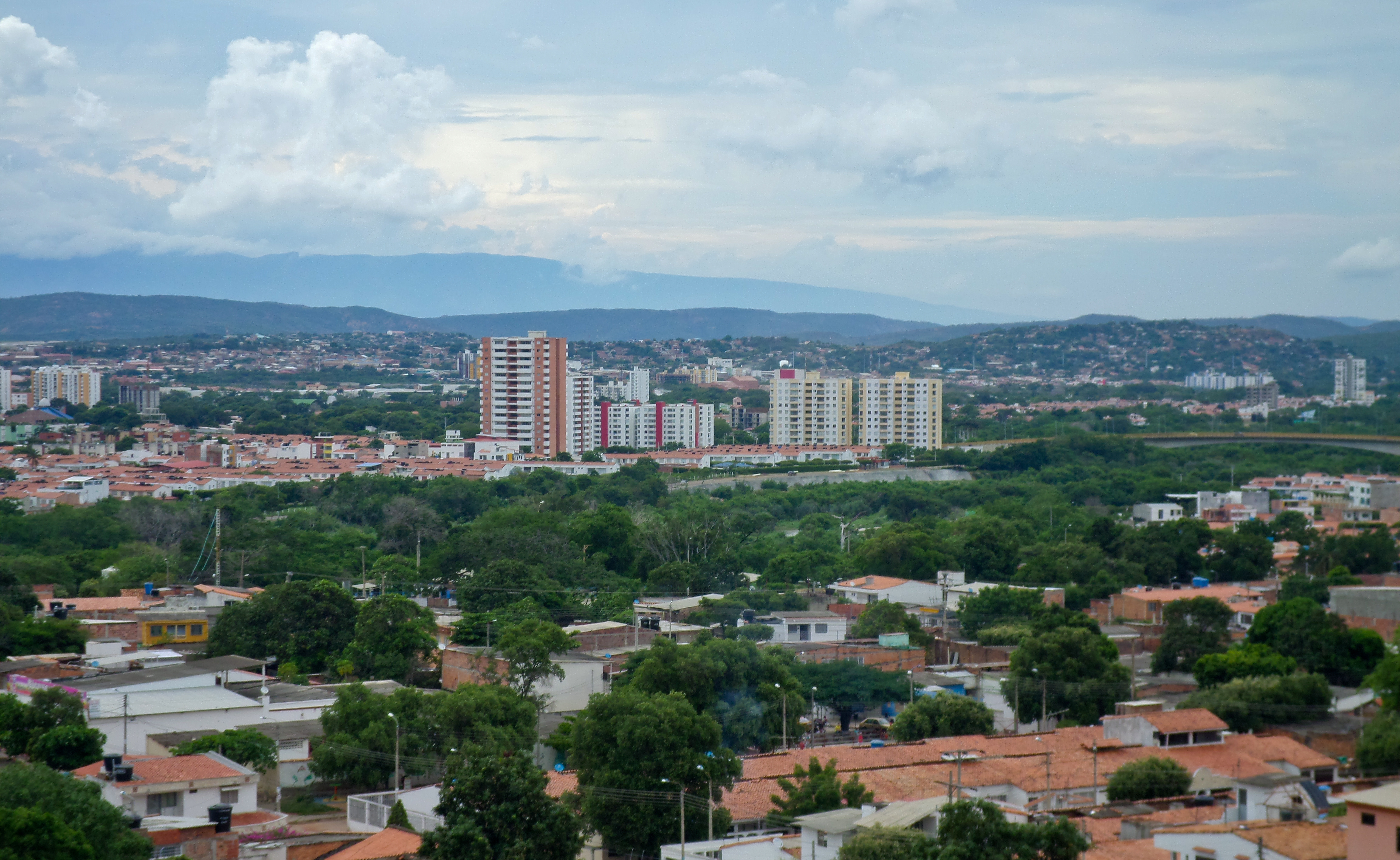 edificios